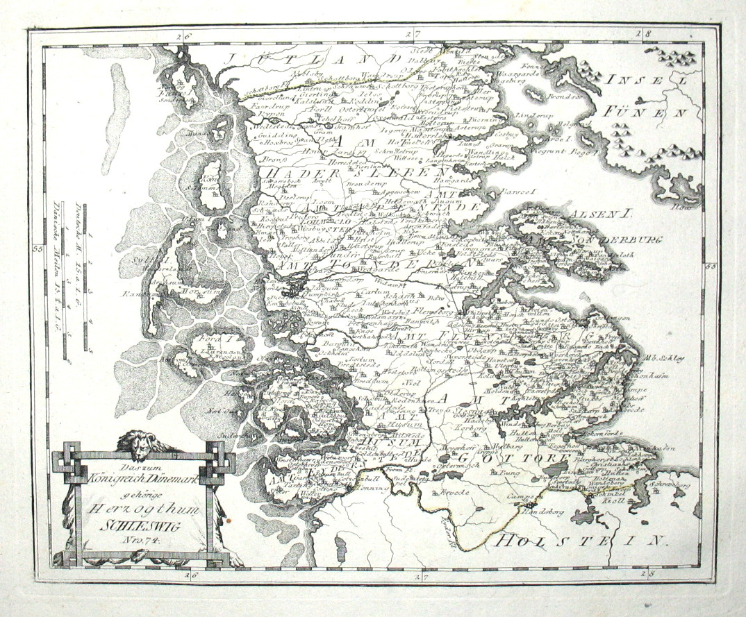 Das zum Koenigreich Daenemark gehoerige Herzogthum Schleswig. Nro. 74. Kupferstich, 23,4 × 28,9 cm